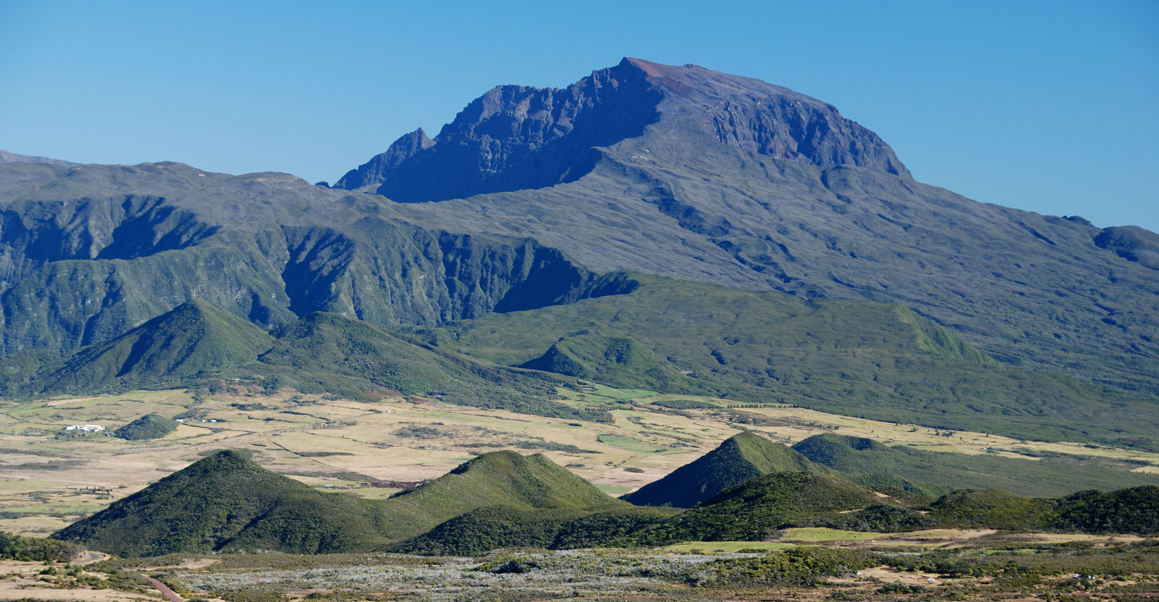 Piton des neiges